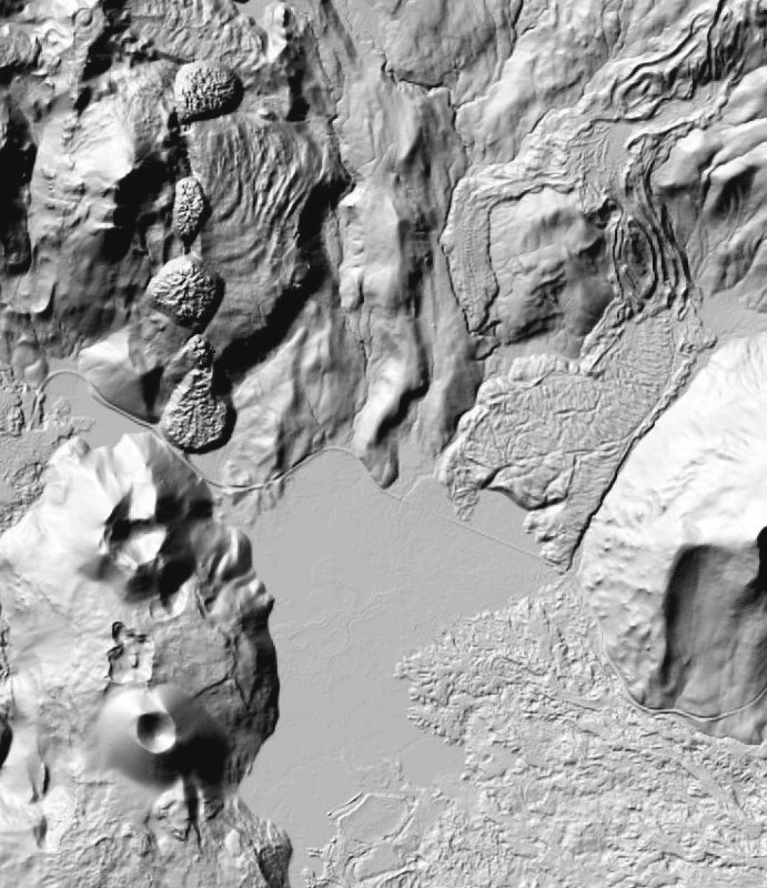 Capture Lidar du Lac Sparks, au sud de South Sister, dans la chaîne des Three Sisters, montrant les anciennes coulées de lave. La route Cascade Lakes Highway passe au nord du lac.